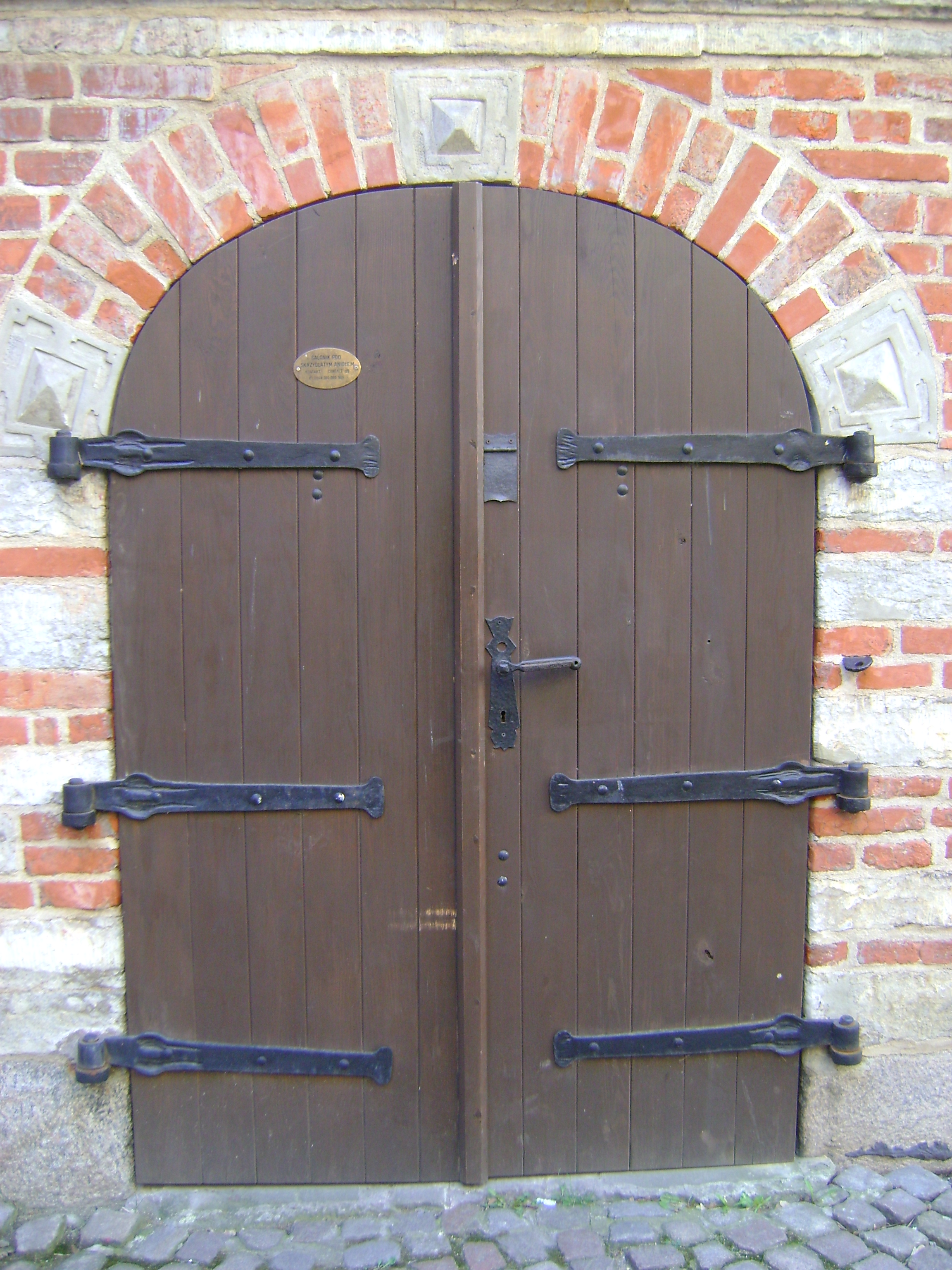 Łuk koszowy - element konstrukcyjny w kształcie łuku wsparty na obu końcach na filarach, zwieńczający otwór bramy. Gdańsk-Główne Miasto, ul. Mariacka 25/26.